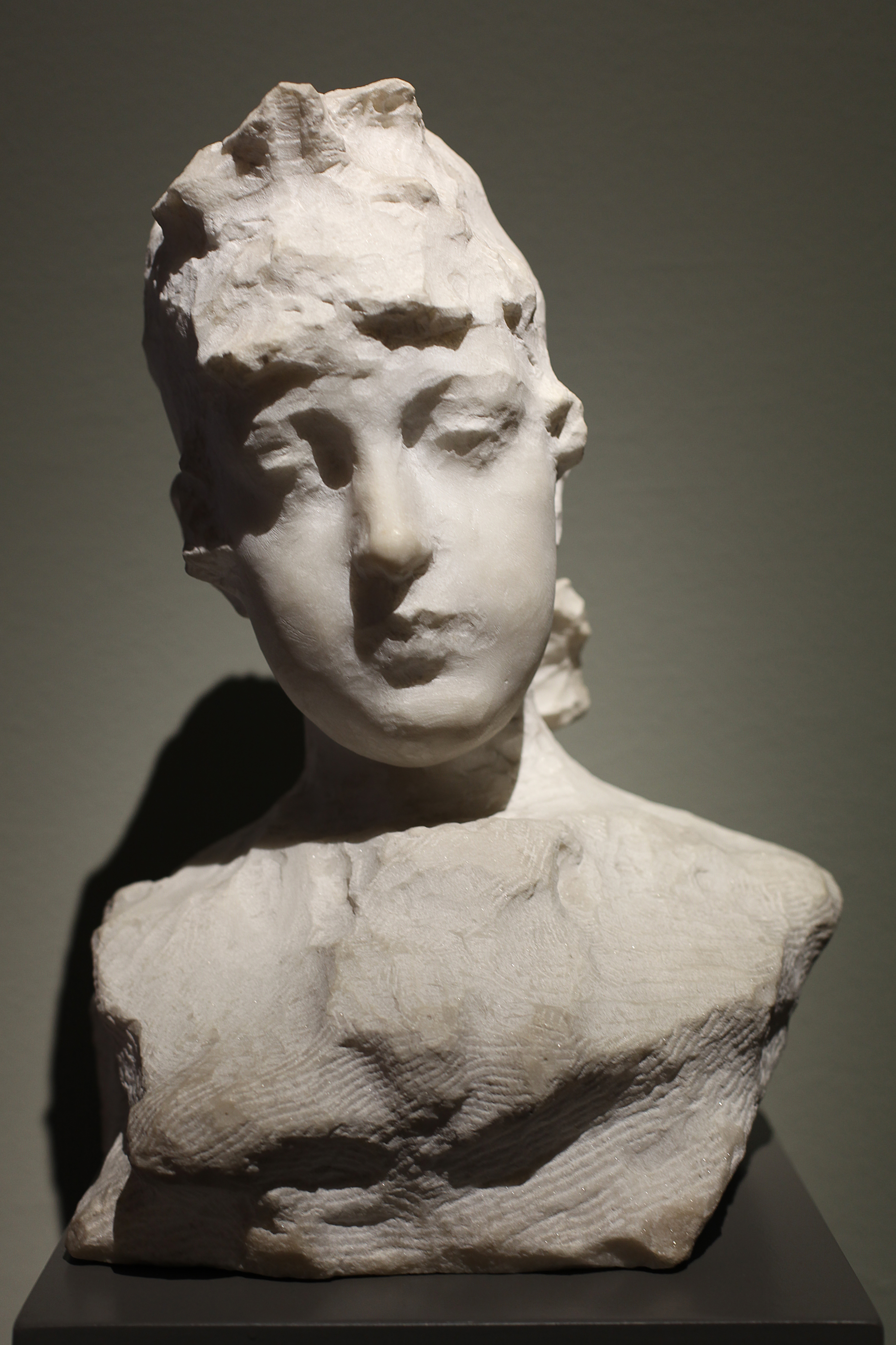 Paolo Troubetzkoy (1866-1938) Busto di giovane donna - ritratto di Emilia Cairati Vogt (1897); Galleria d'Arte Moderna di Milano, dono Cairati, 1933